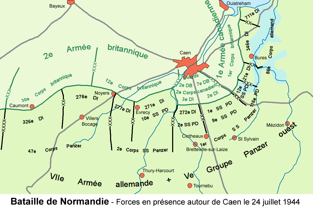 Forces en présence autour de Caen